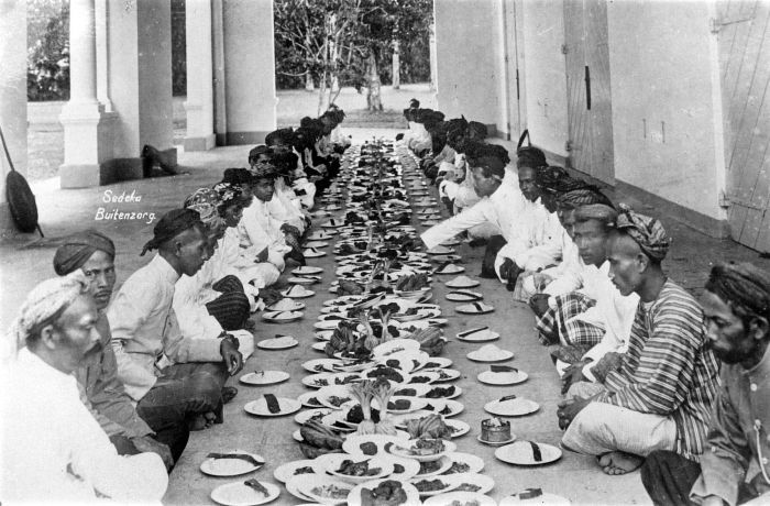 Repronegatief. De religieuze maaltijd 'sedekah of selamatan' te Buitenzorg, Java